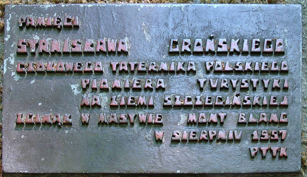 Tablica na Głazie Stanisława Grońskiego w Puszczy Bukowej pod Szczecinem.